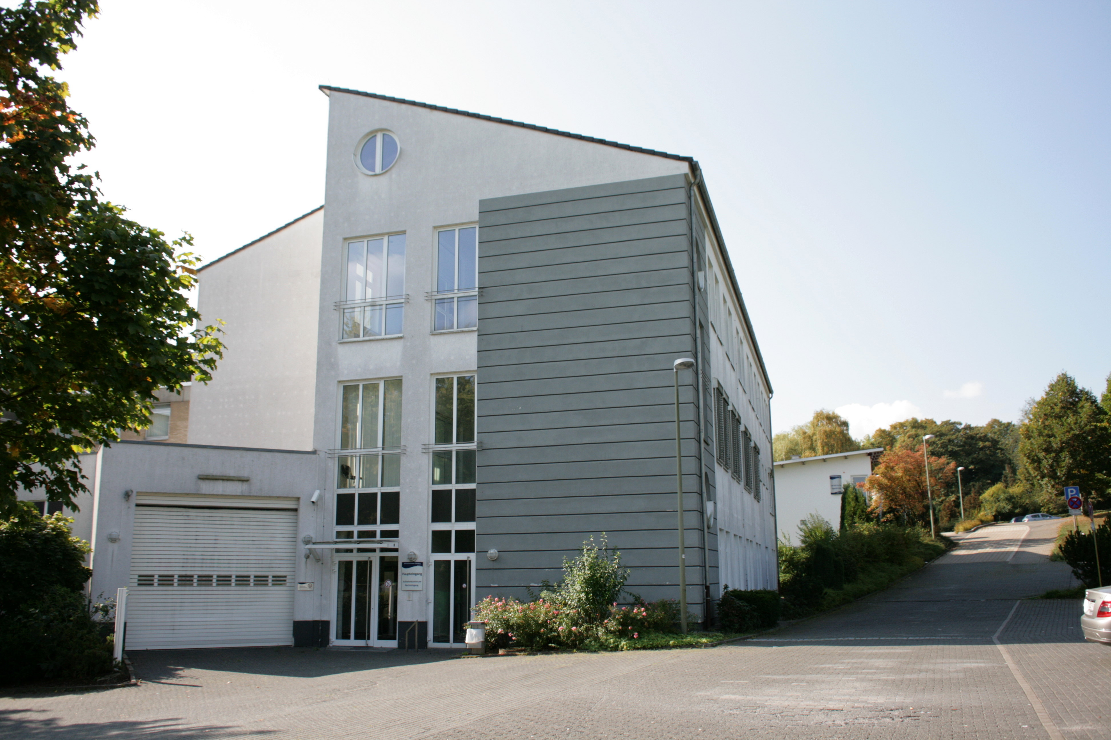 Herz-Jesu-Krankenhaus, Boromäusstraße in Lindlar